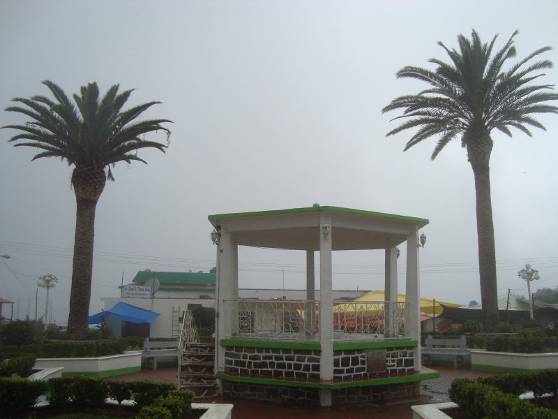 La foto montras la centran placon (Zocalo) de la vilaĝo Nicolás Flores (Hidalgo)